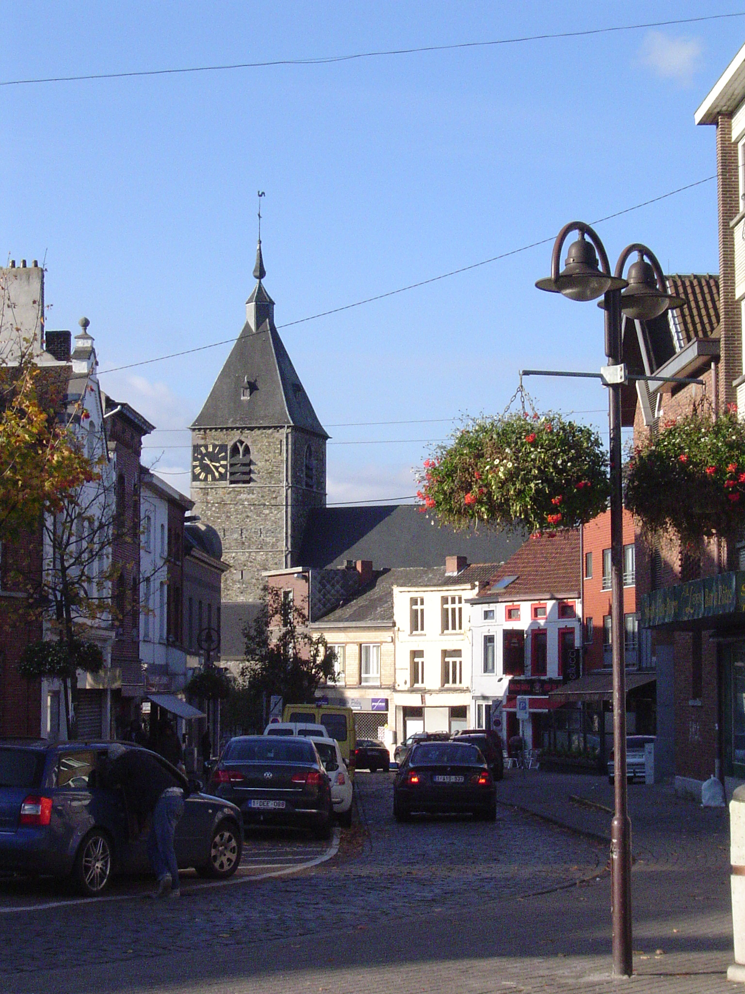 L'église, vue du Plateau de la gare